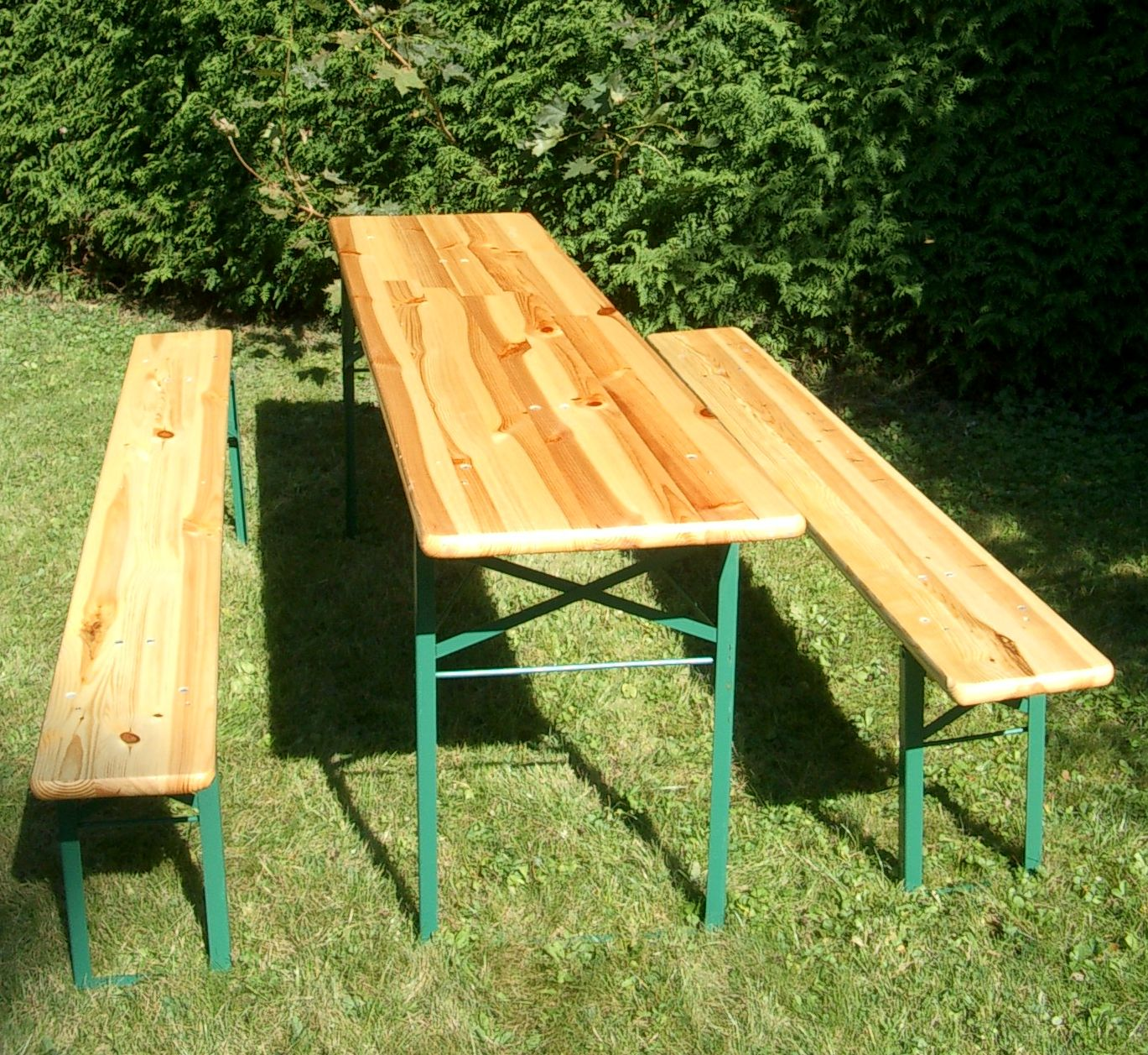 Eine Biergarnitur auf grüner Wiese.